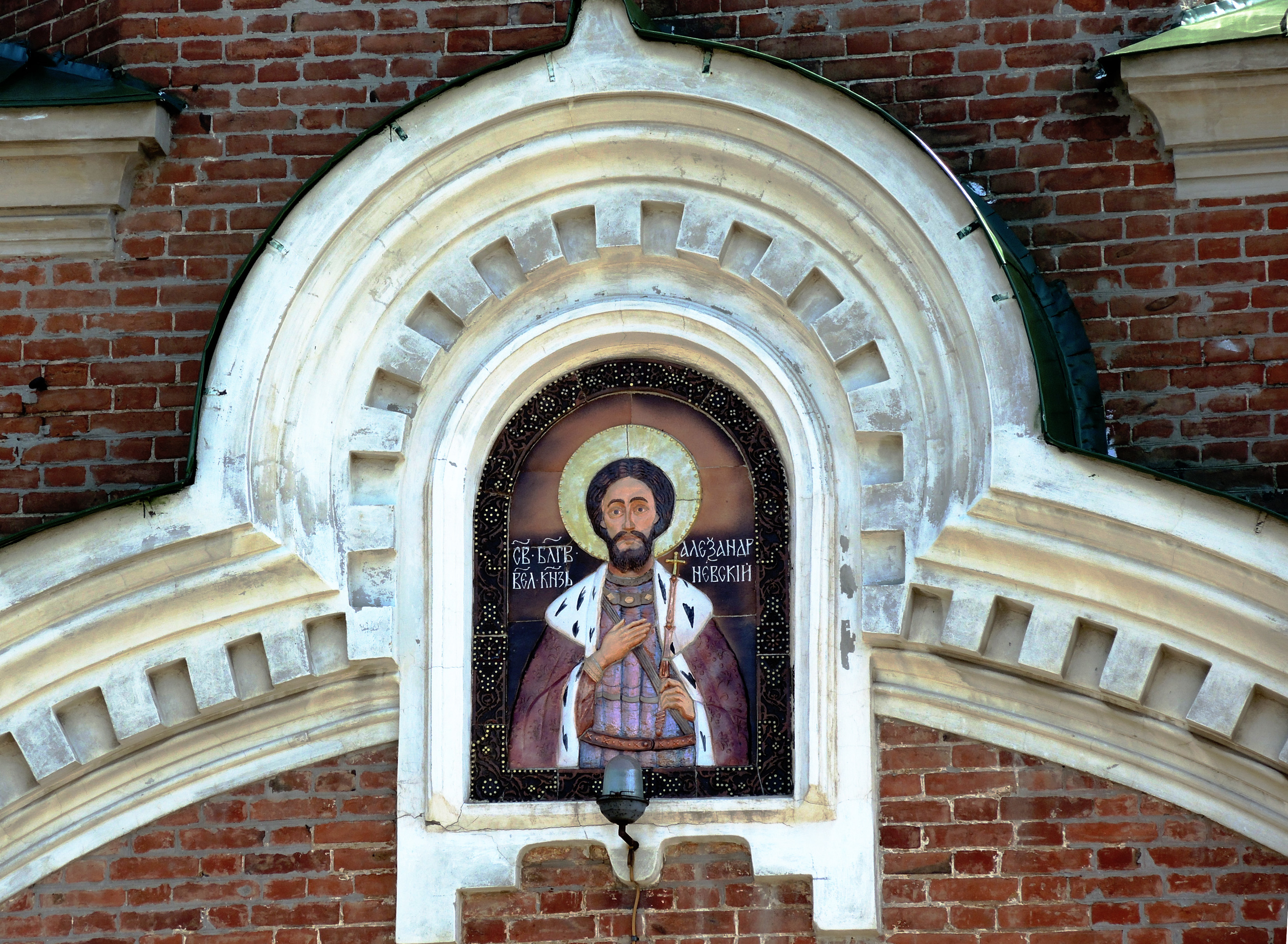 Церковь Александра Невского: площадь Свободы, 1, Новочеркасск, Ростовская область